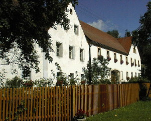 Gehöft in Hundsbach Fotograf: Walter J.Pilsak Copyright Status: GNU Freie Dokumentationslizenz